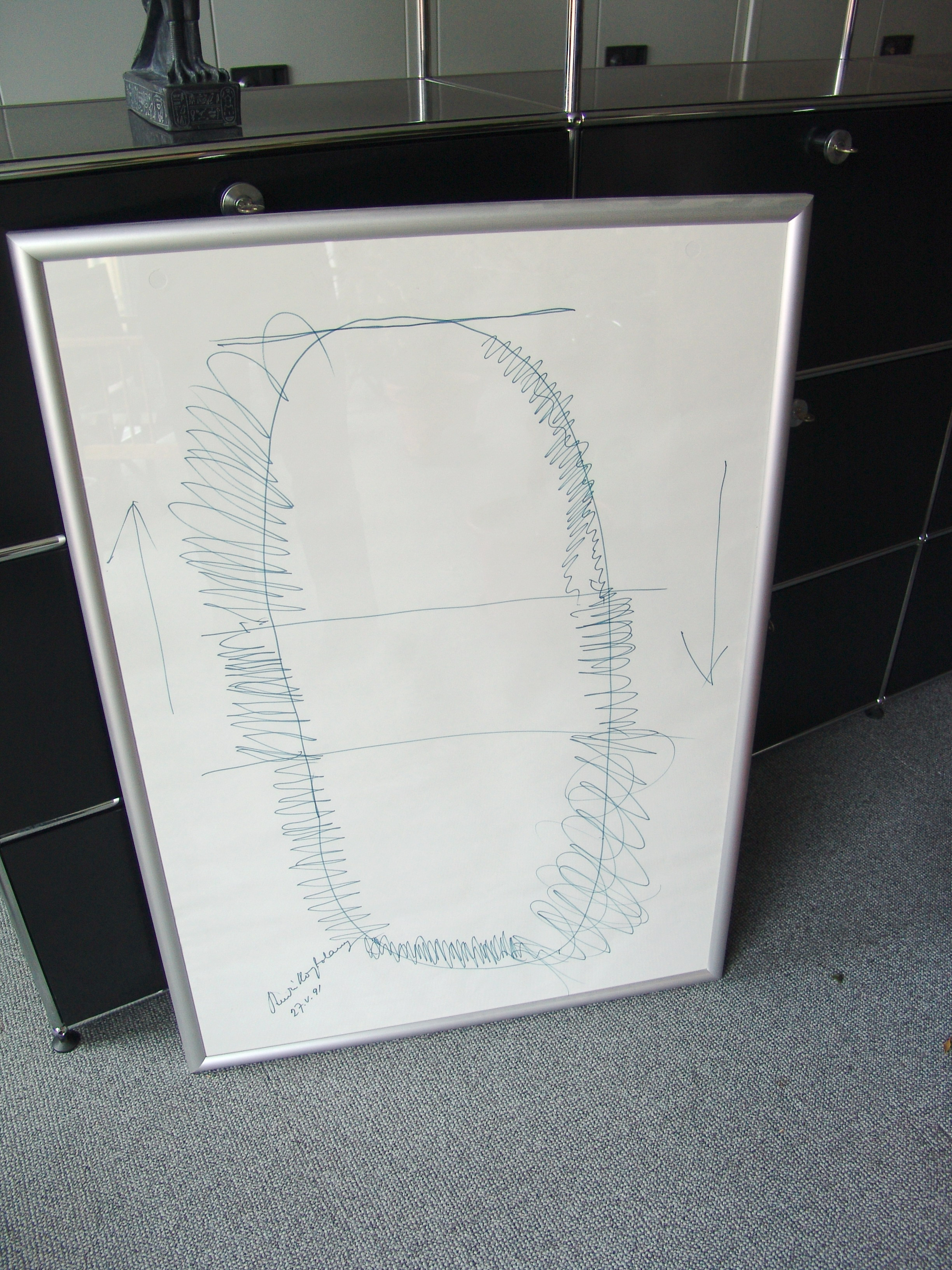 Originale Handzeichnung von André Kostolany - Das Auf und Ab der Börse